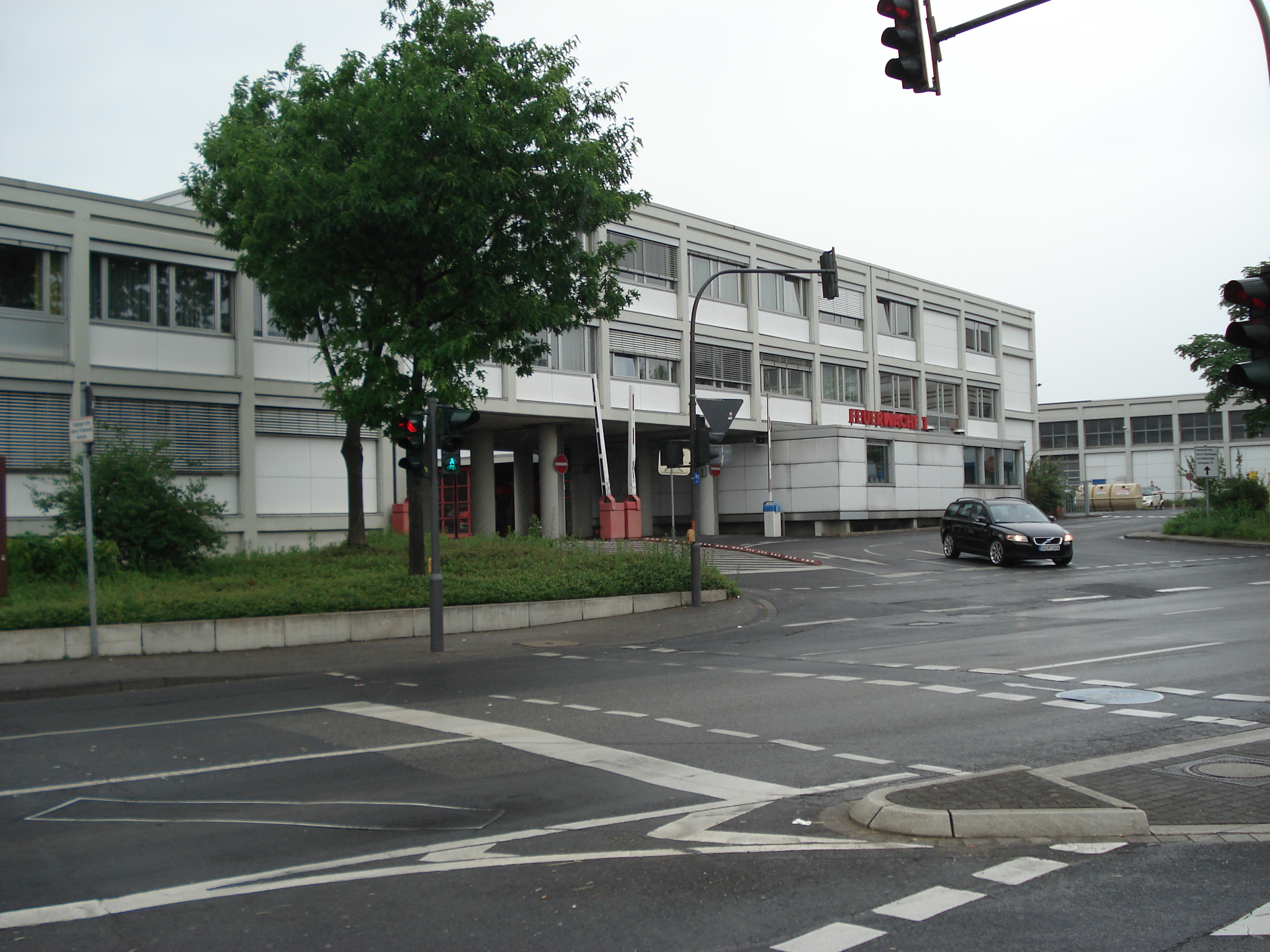 Feuerwache Bonn, Hauptfeuerwache, Lievelingsweg 112, Bonn-Tannenbusch